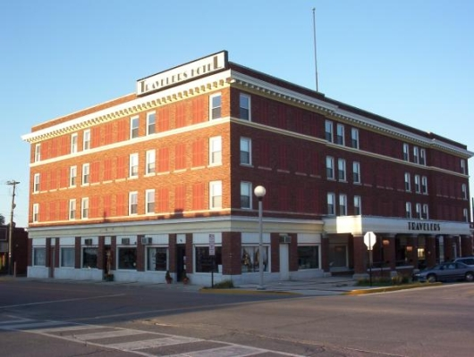 Traveler's Hotel, Kirksville, MO